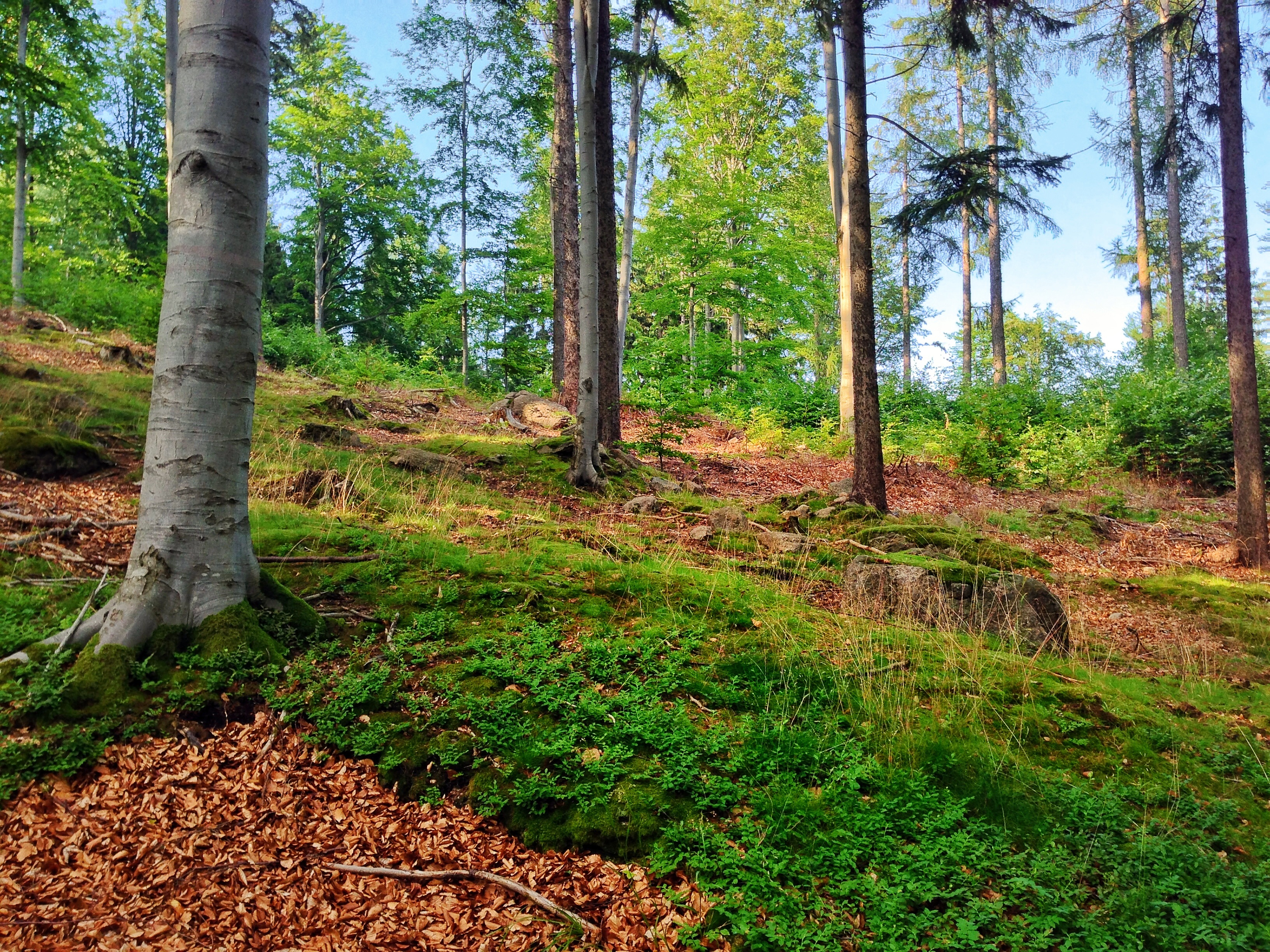 Les na svazích krkonošské hory Grzybowiec